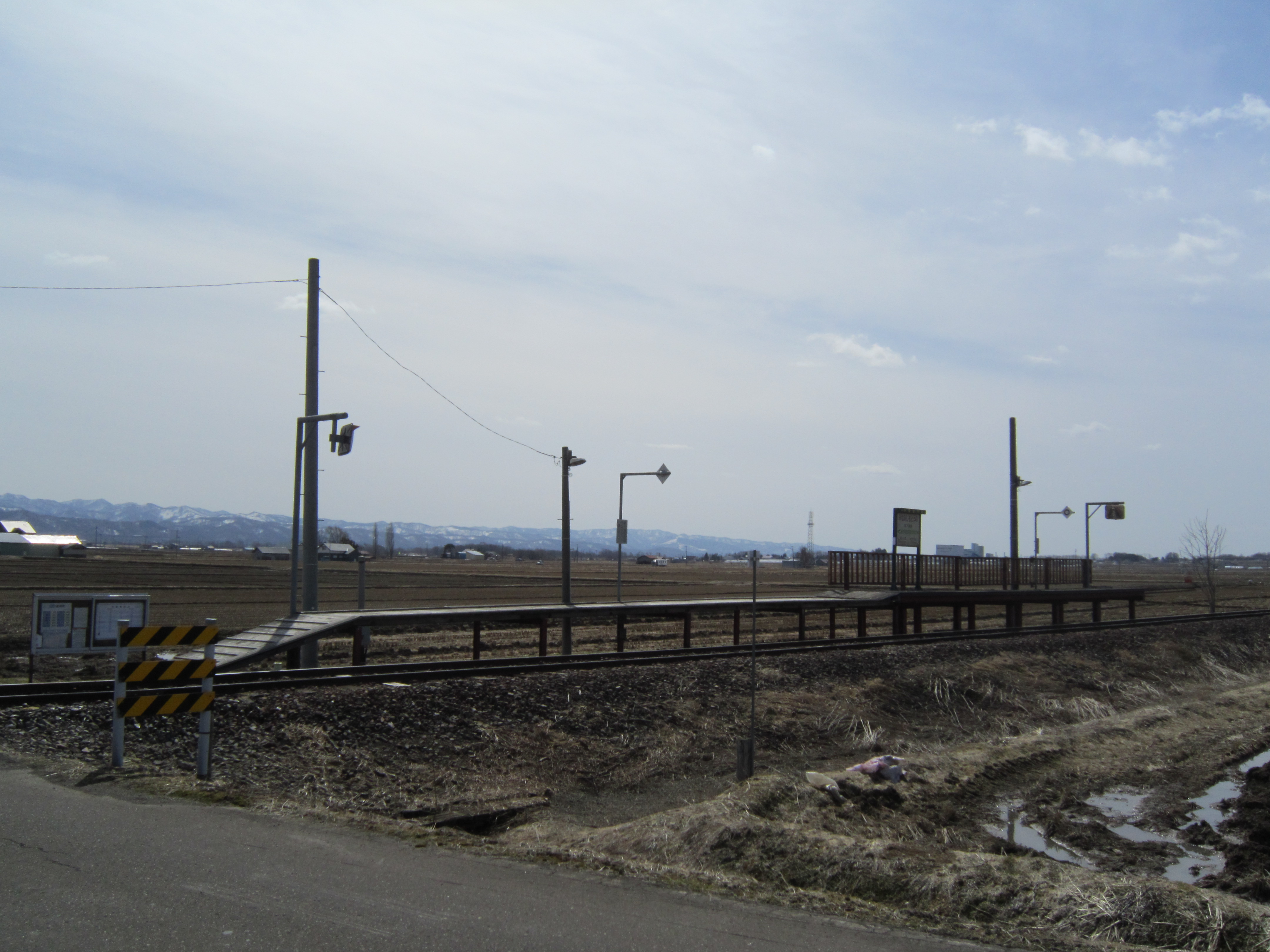 南下徳富駅